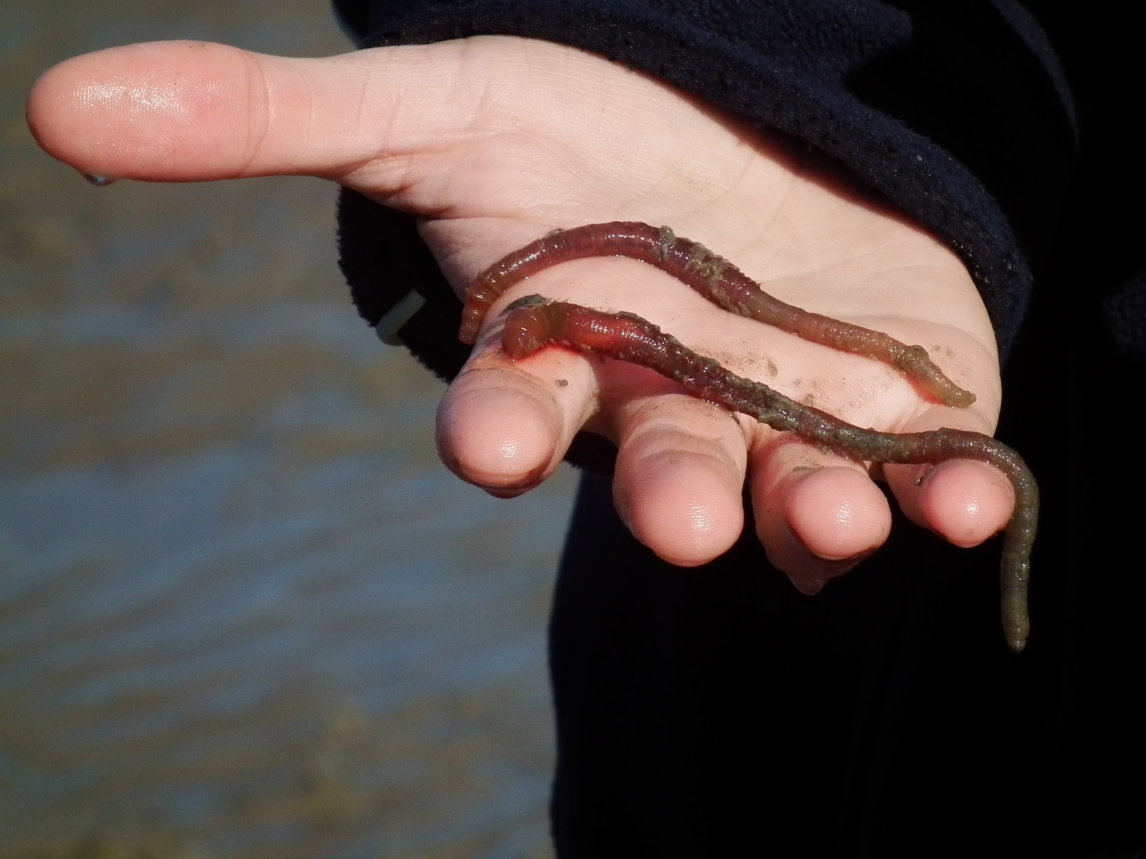 Wattwürmer (Arenicola marina)